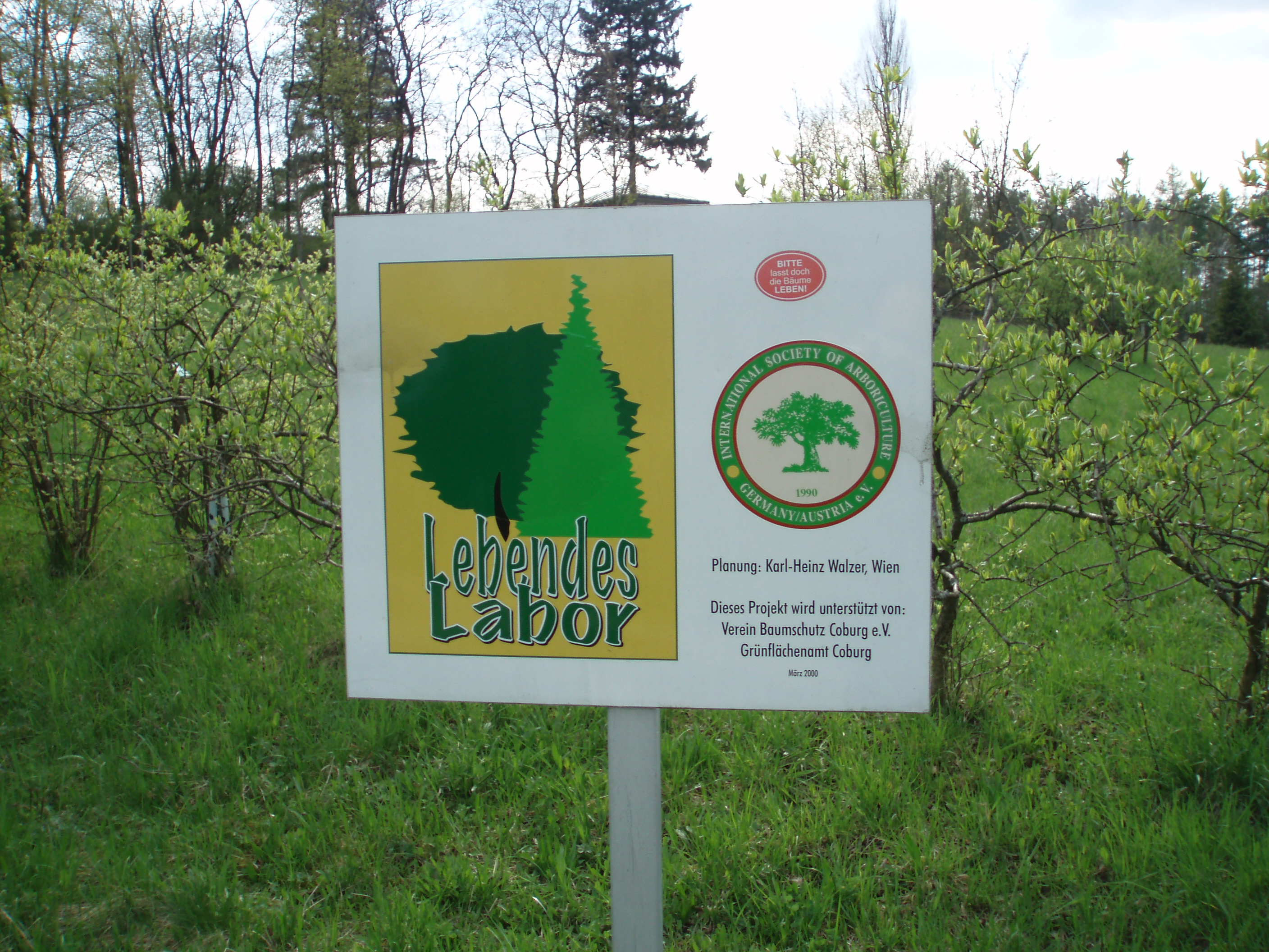 Grünes Labor Coburg, Informationsschild